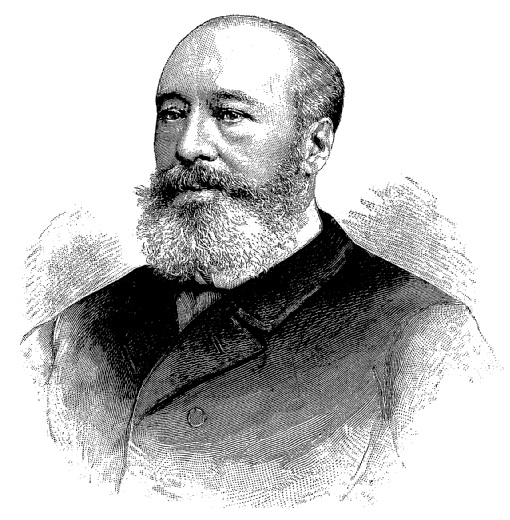 "M. Lambert de Sainte-Croix".